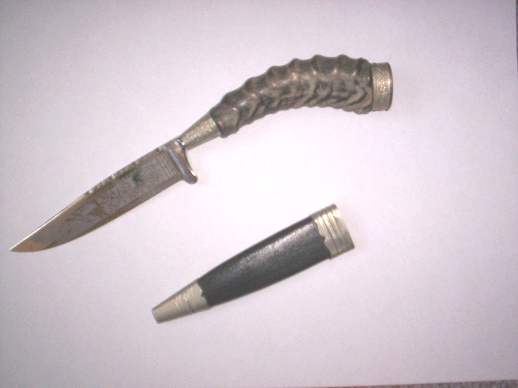 Trachtenmesser